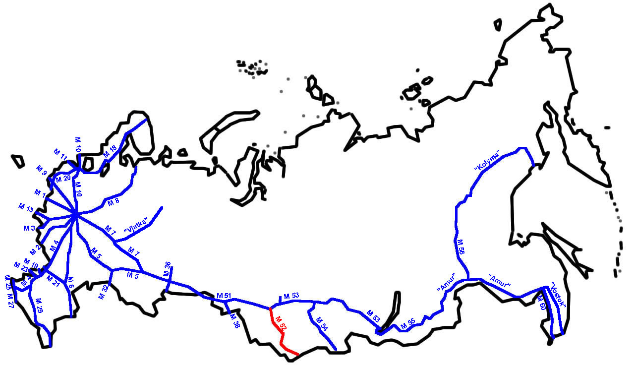 M52 im russischen Fernstraßennetz